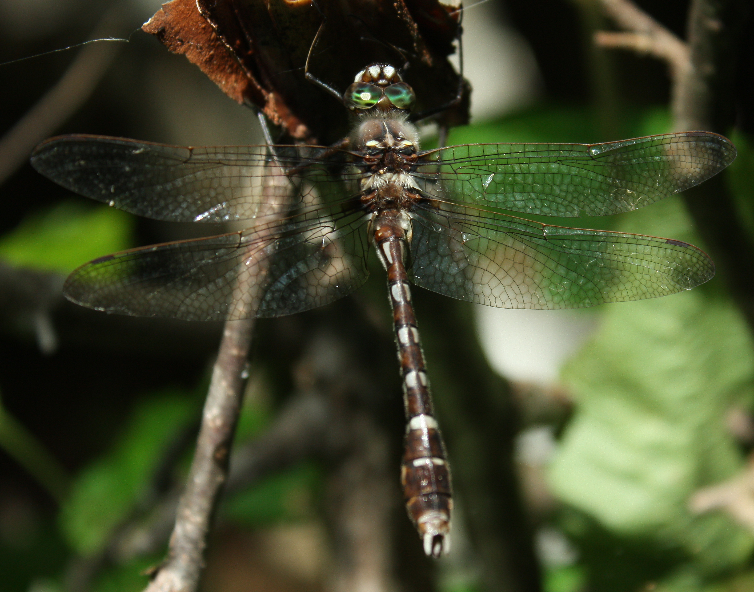 Didymops transversa mâle. 9 juillet 2014. Bas-Saint-Laurent, Québec.